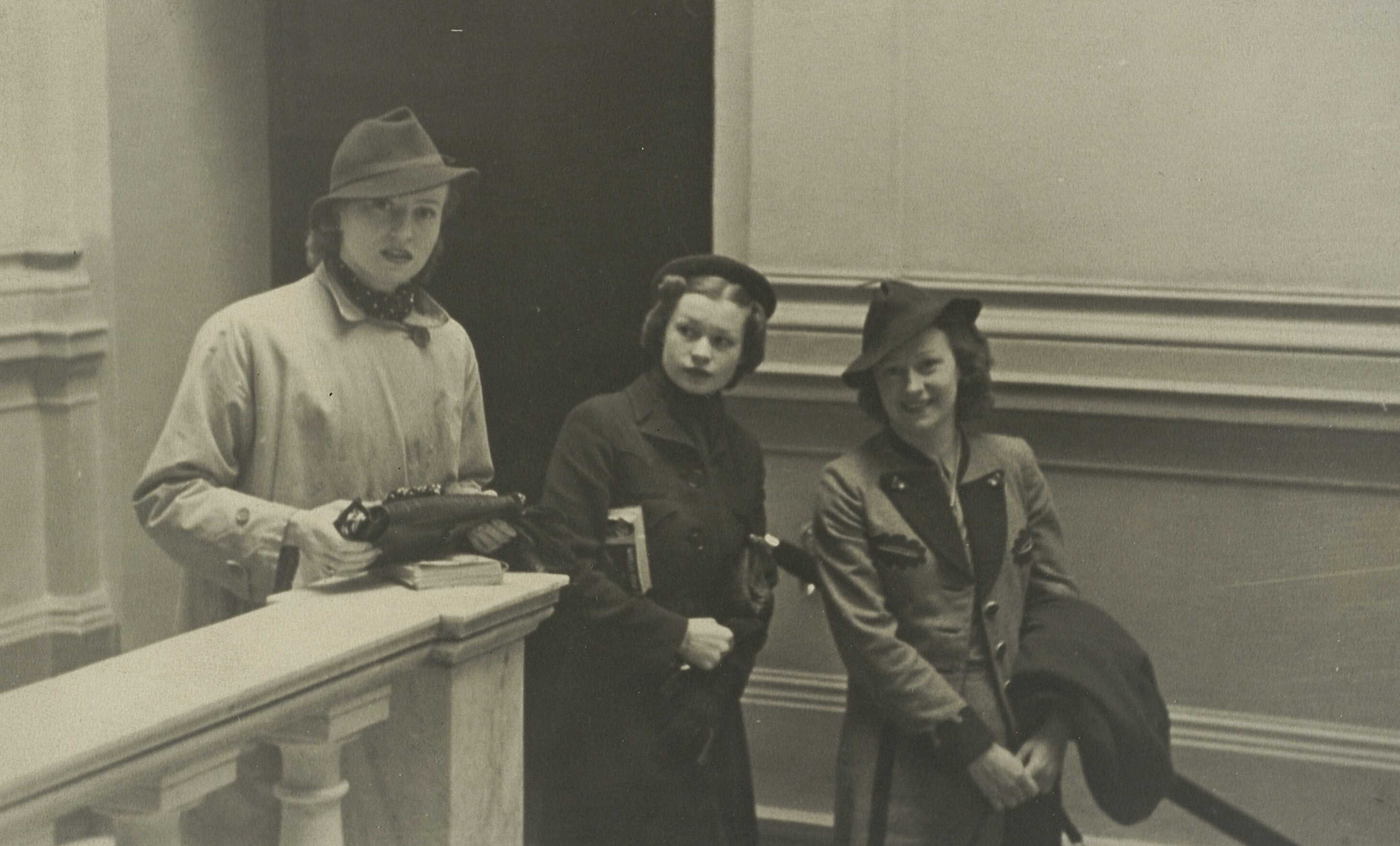 Siostry Halama (Alicja, Helena i Loda)